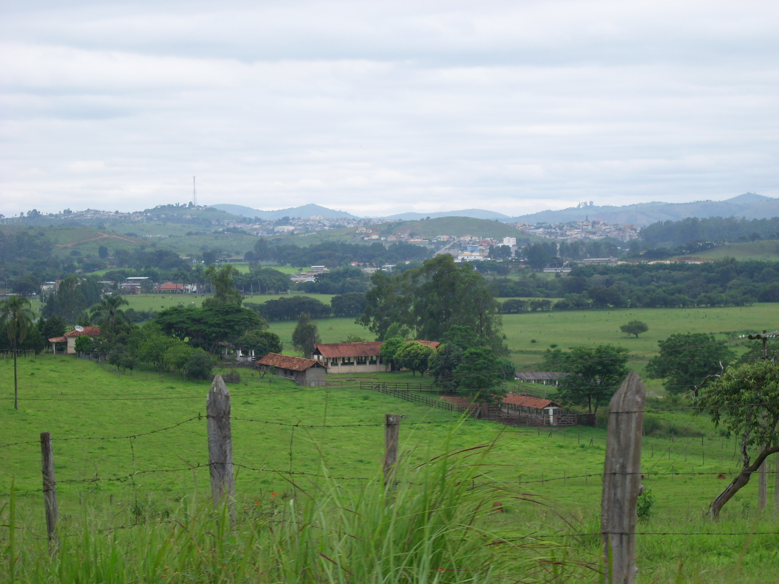 Vista Parcial da Cidade de Barros MG - Estrada Dors de Campos - Barroso